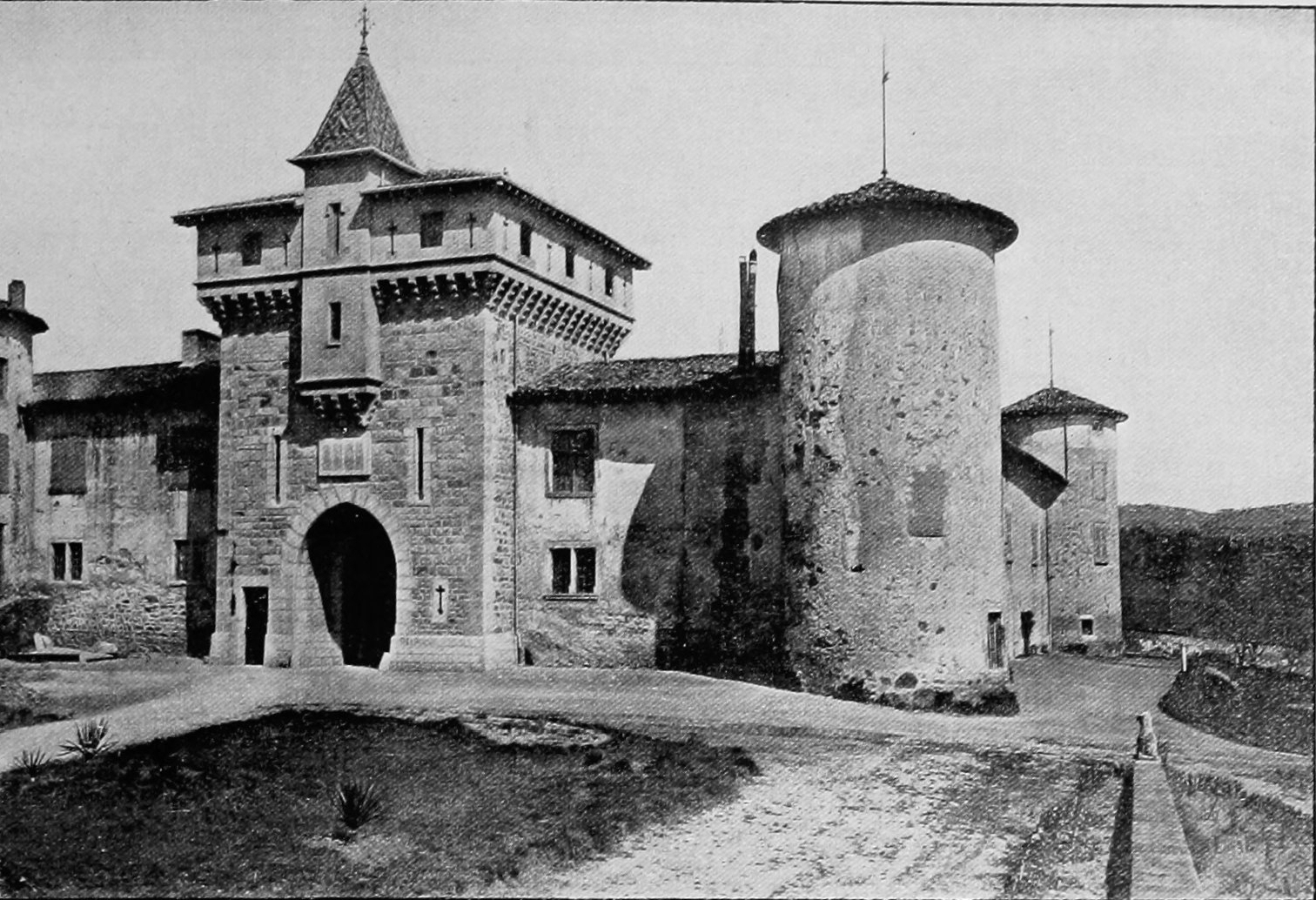 Dictionnaire illustré des communes du département du Rhône. Tome 2 / par MM. E. de Rolland et D. Clouzet.